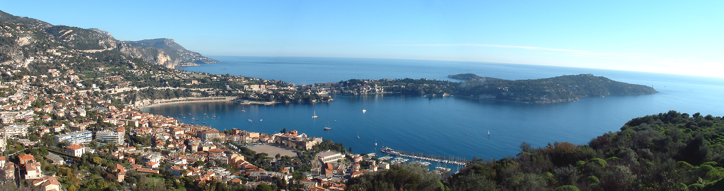 Villefranche-sur-Mer - La rade de Villefranche-sur-Mer, le fort Saint-Elme contrôlant la rade de Villefranche entre le cap Ferrat et le mont Boron, vue du Mont Boron